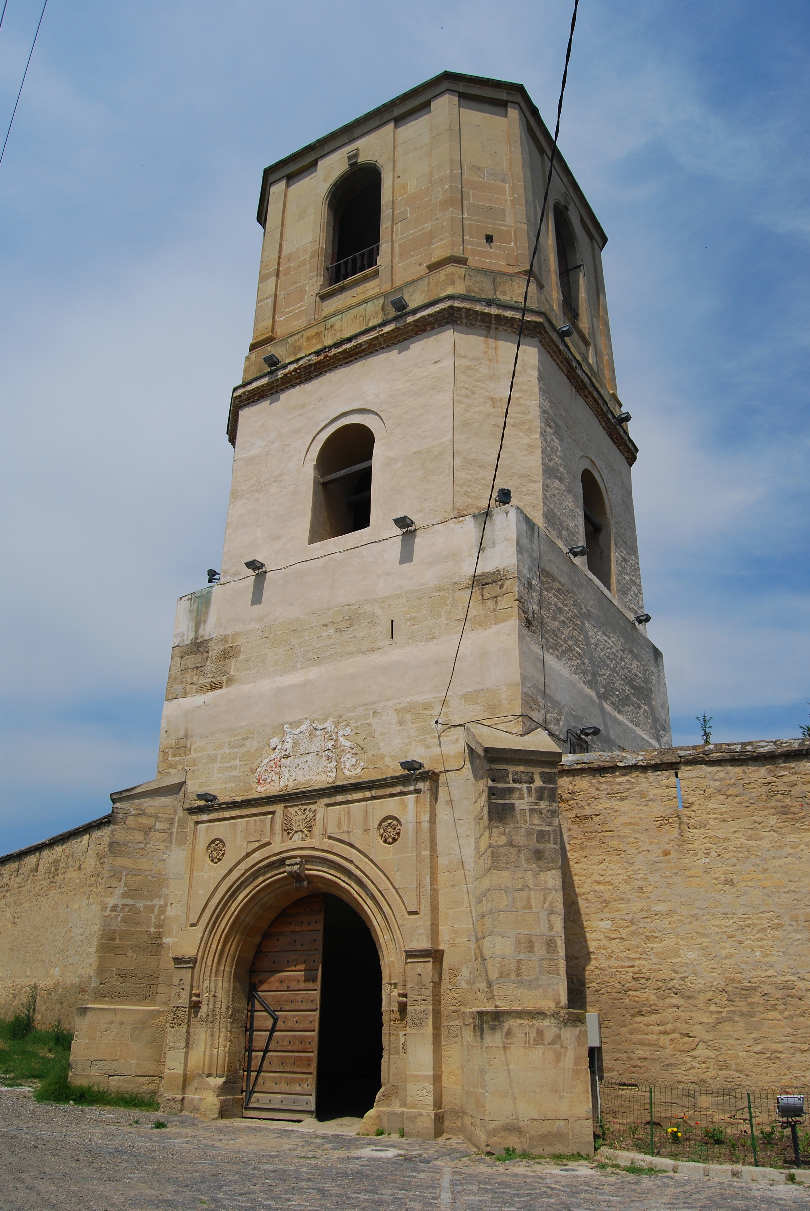 Turn clopotniță 03